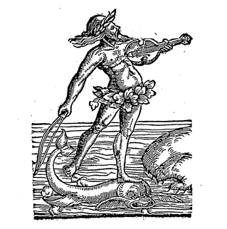 Druckermarke des Johannes Oporinus vom Titelblatt des ersten bandes der Magdeburger Centurien, Basel 1556